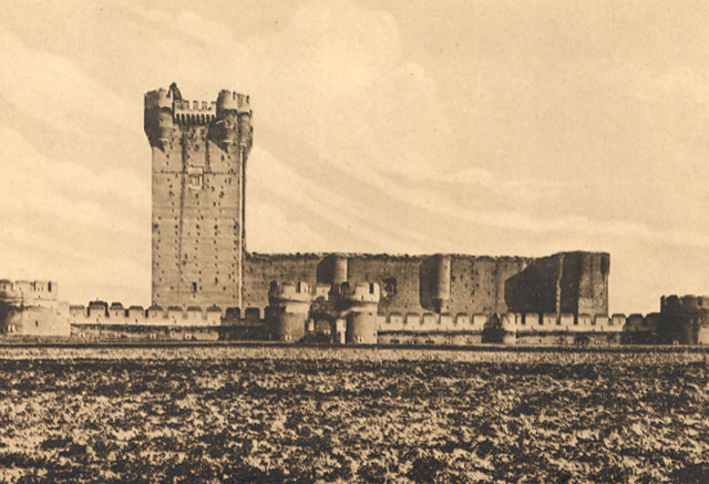 Castillo de la Mota - Medina del Campo (Valladolid) - Heliotipia Artística Española. Recuerdos Artísticos e Históricos de la Provincia. Fotos Gilardi. Curioso ejemplar en ladrillo. Reconstruido en el siglo XV y reformado por los Reyes Católicos. - Impresión. Papel 170 x 115 Sepia